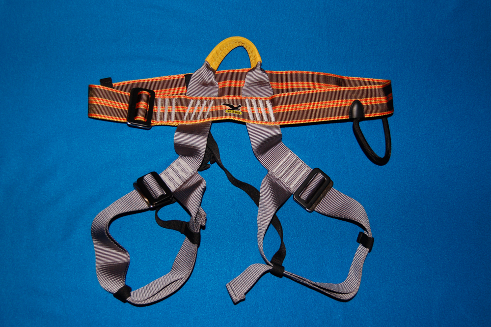 Imbragatura appositamente pensata per le vie ferrate. Marca Salewa.